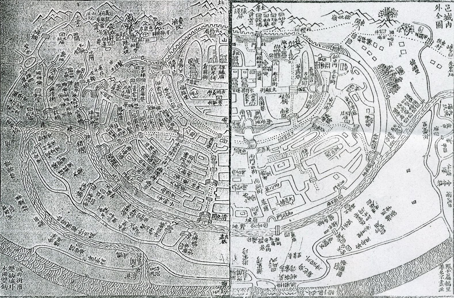 道光廿一年新會城地圖